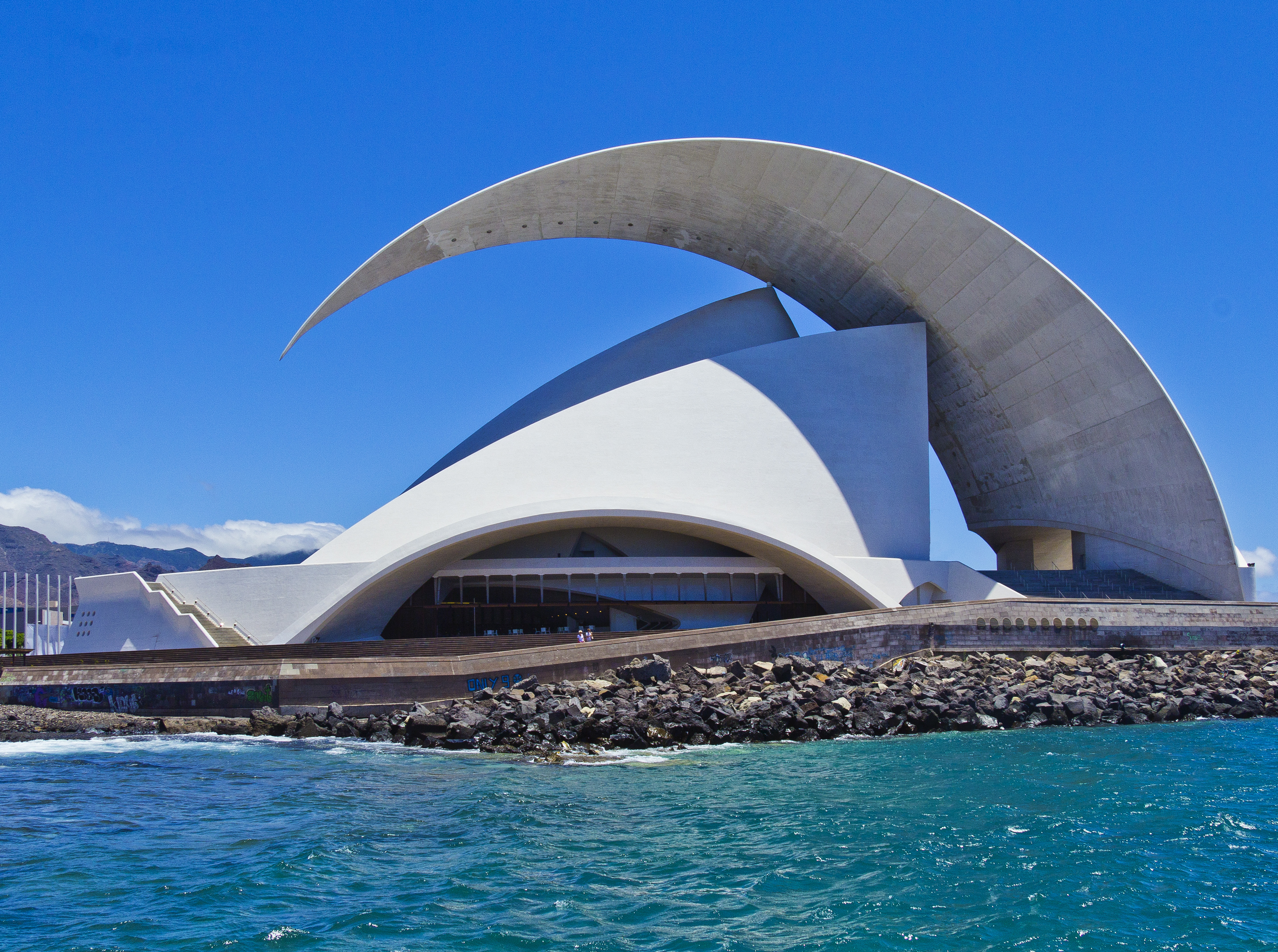 Auditorio de Tenerife „Adán Martín“ in Santa Cruz de Tenerife, Blick von Süden